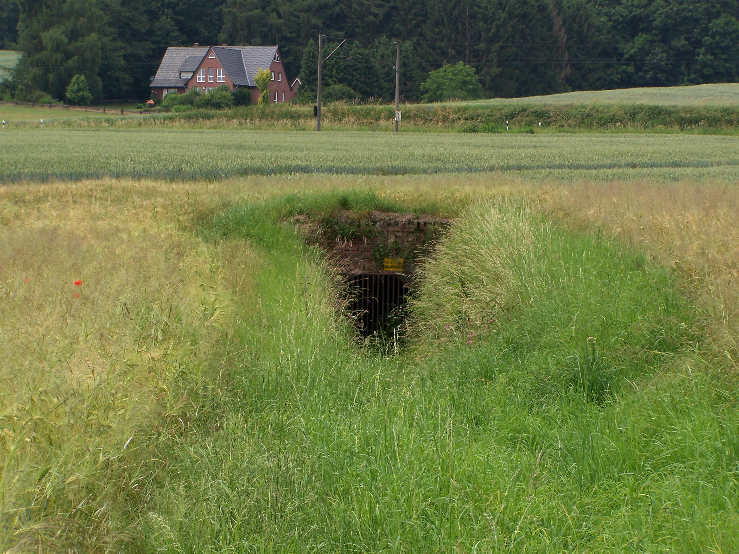 Mundloch des Permer Stollens. Es ist der Beginn des unterirdisch verlaufenden gleichnamigen Naturschutzgebiets (ST-121).